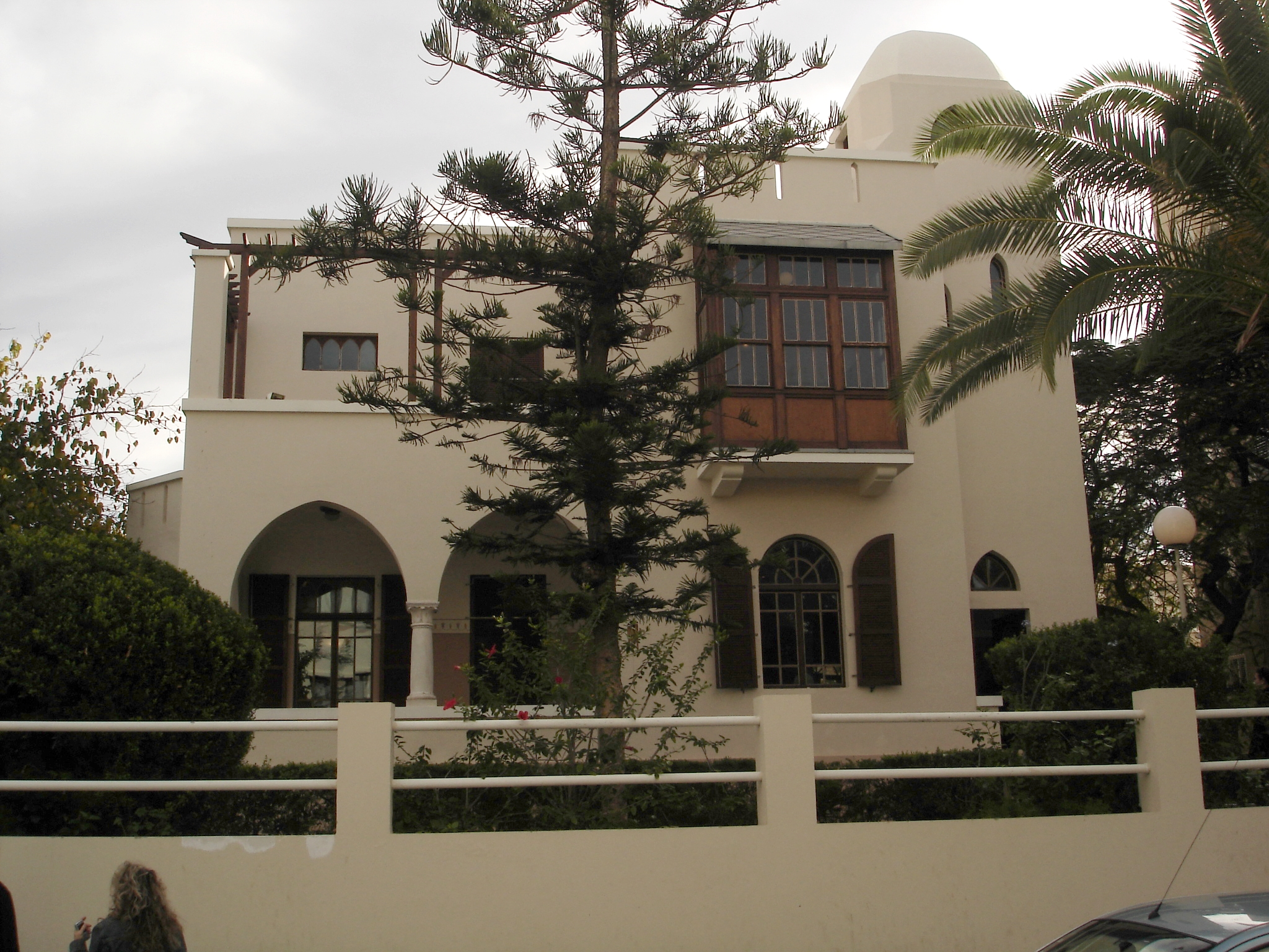 Home of H.M Bialik; Bialik street, Tel Aviv, Israel